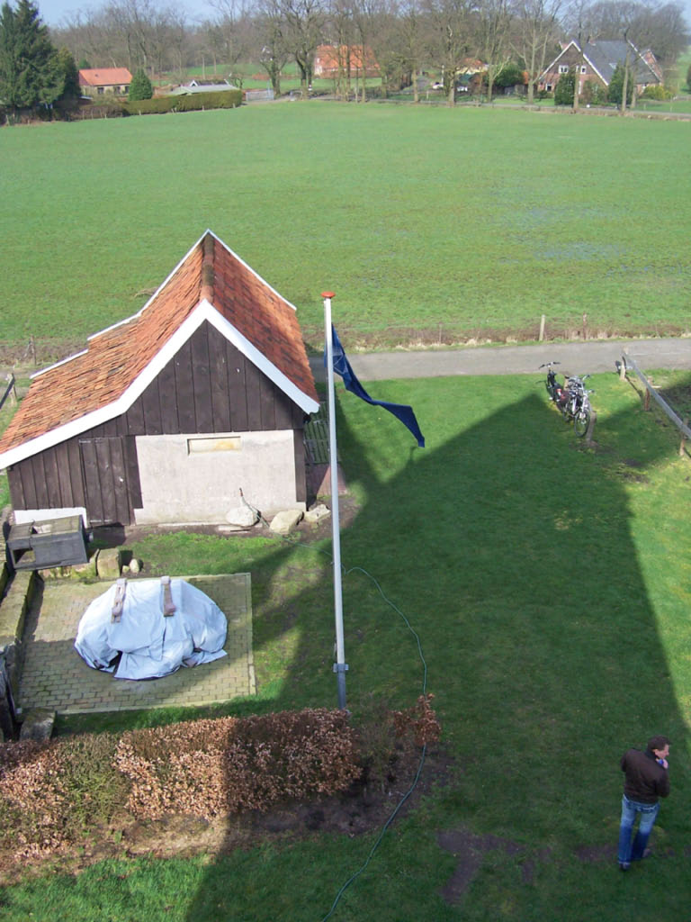 Picture Wissinks Möl (Windmill in Usselo, Enschede, Netherlands)